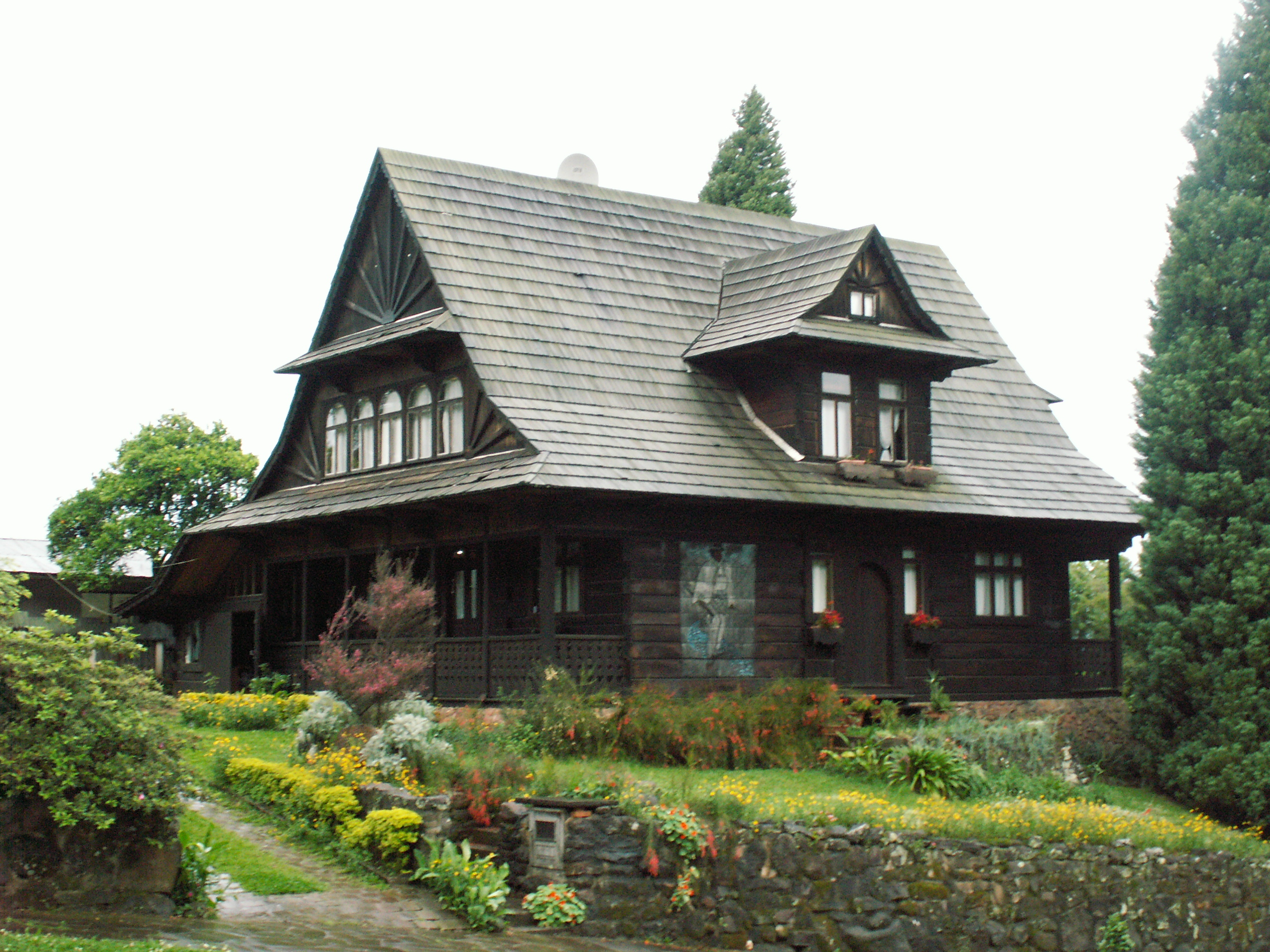 Casa polonesa em Nova Prata, Brasil.